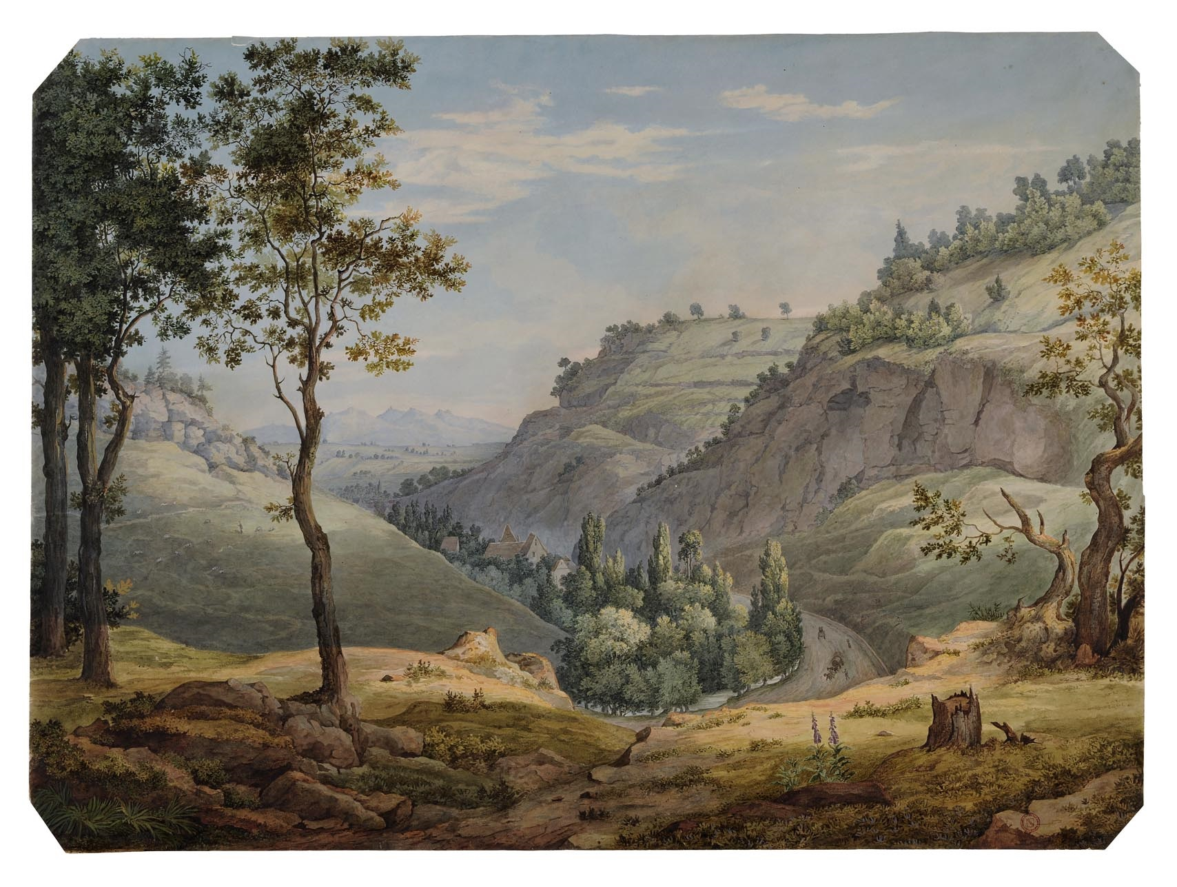 Paysage du Kronthal ouvrant sur une vallée. Sur la route, on distingue une deux carrioles